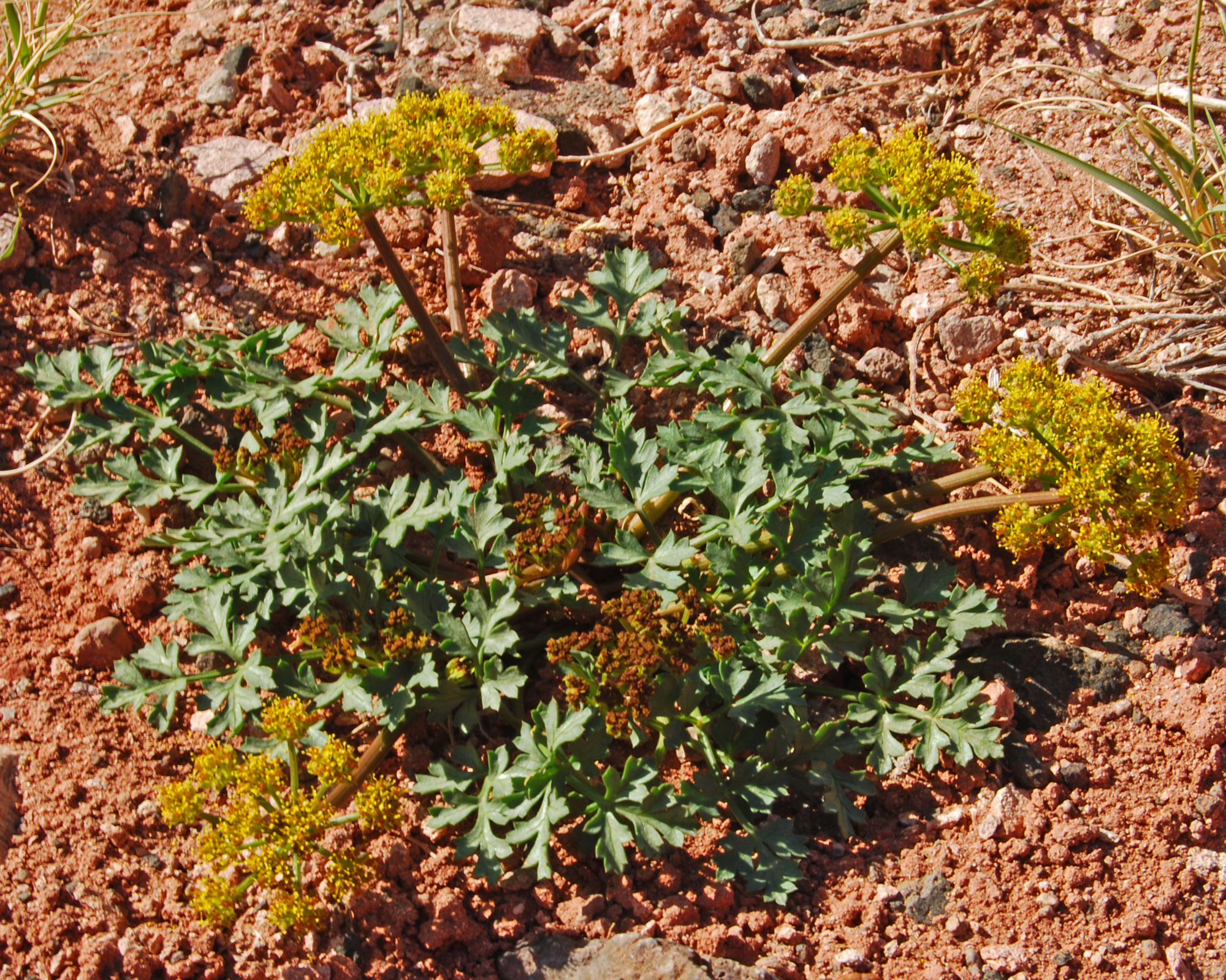 Cymopterus acaulis var. fendleri Fendler’s springparsley Credit Lauren Carter/NPS